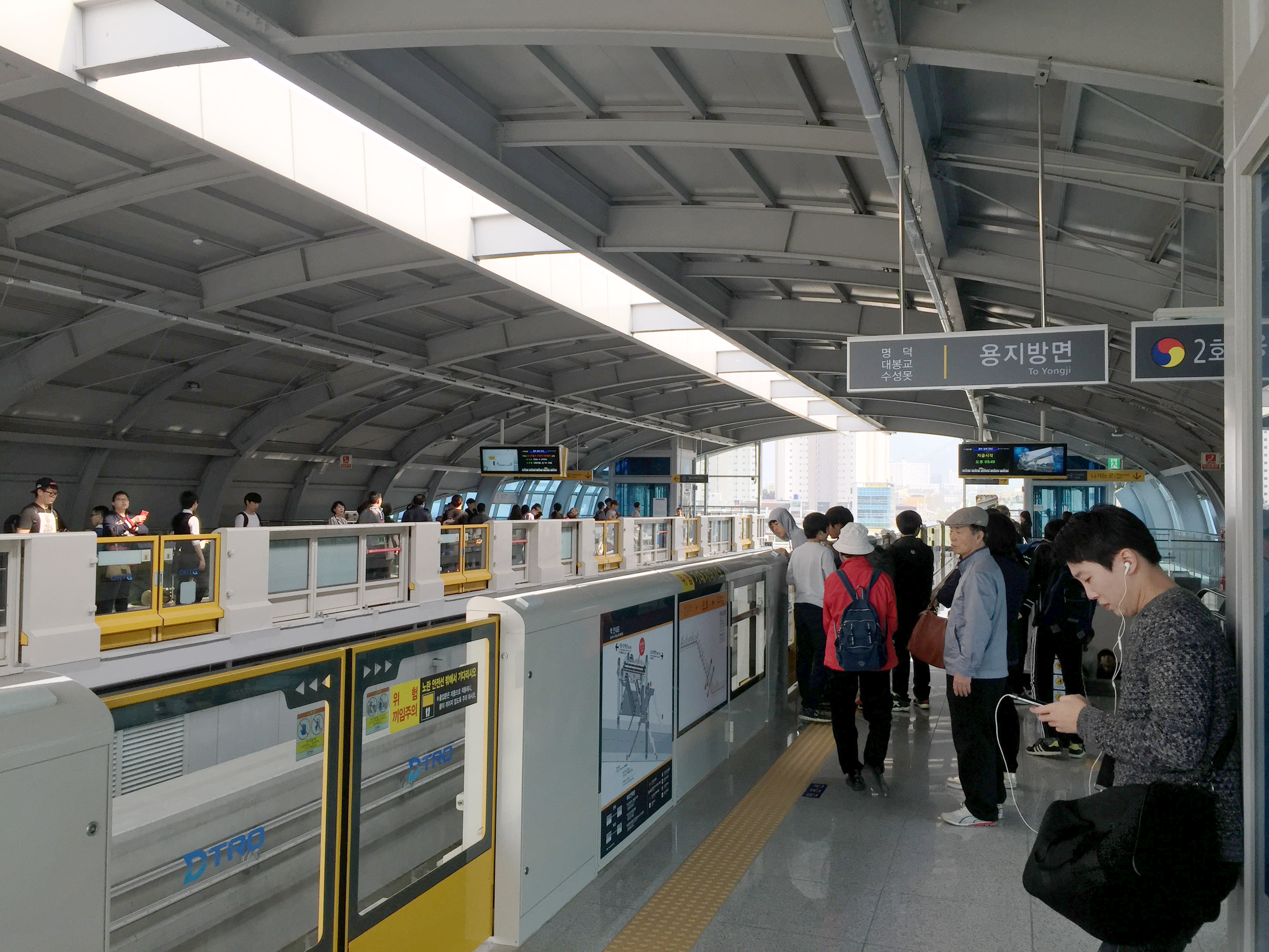 대구3호선 신남역 승강장